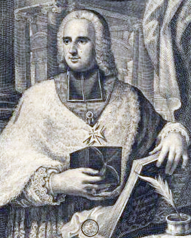 Luís António Verney (1713 — 1792), filósofo, teólogo, padre, professor e escritor português.